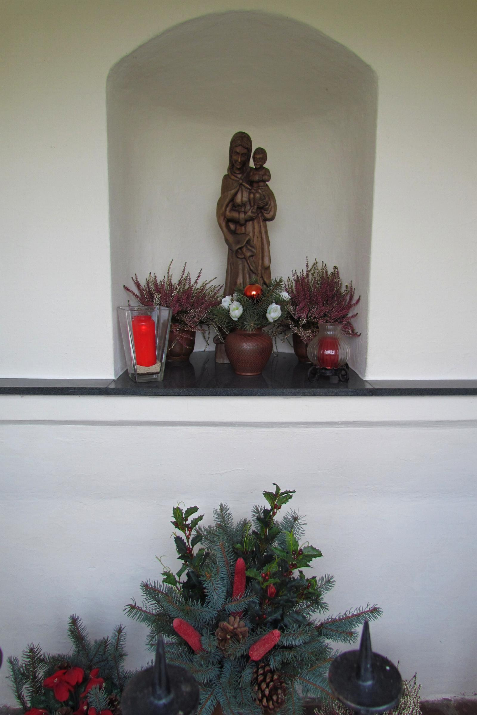 Kirchen und Kapellen in der Stadt Geilenkirchen